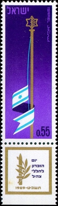 בול יום הזיכרון תשכ"ט